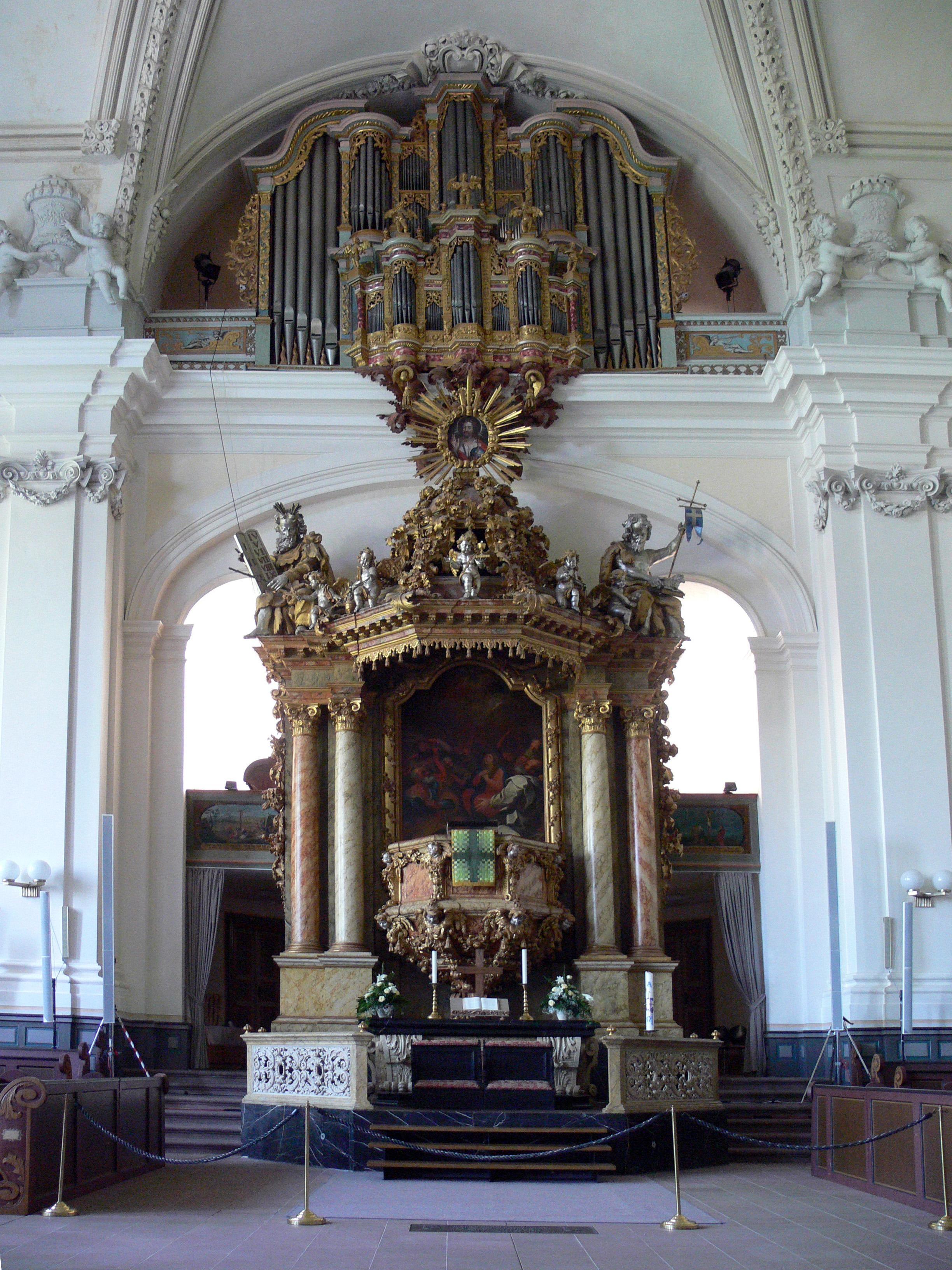 Weilburg/Lahn, Deutschland, Schlosskirche, Altar